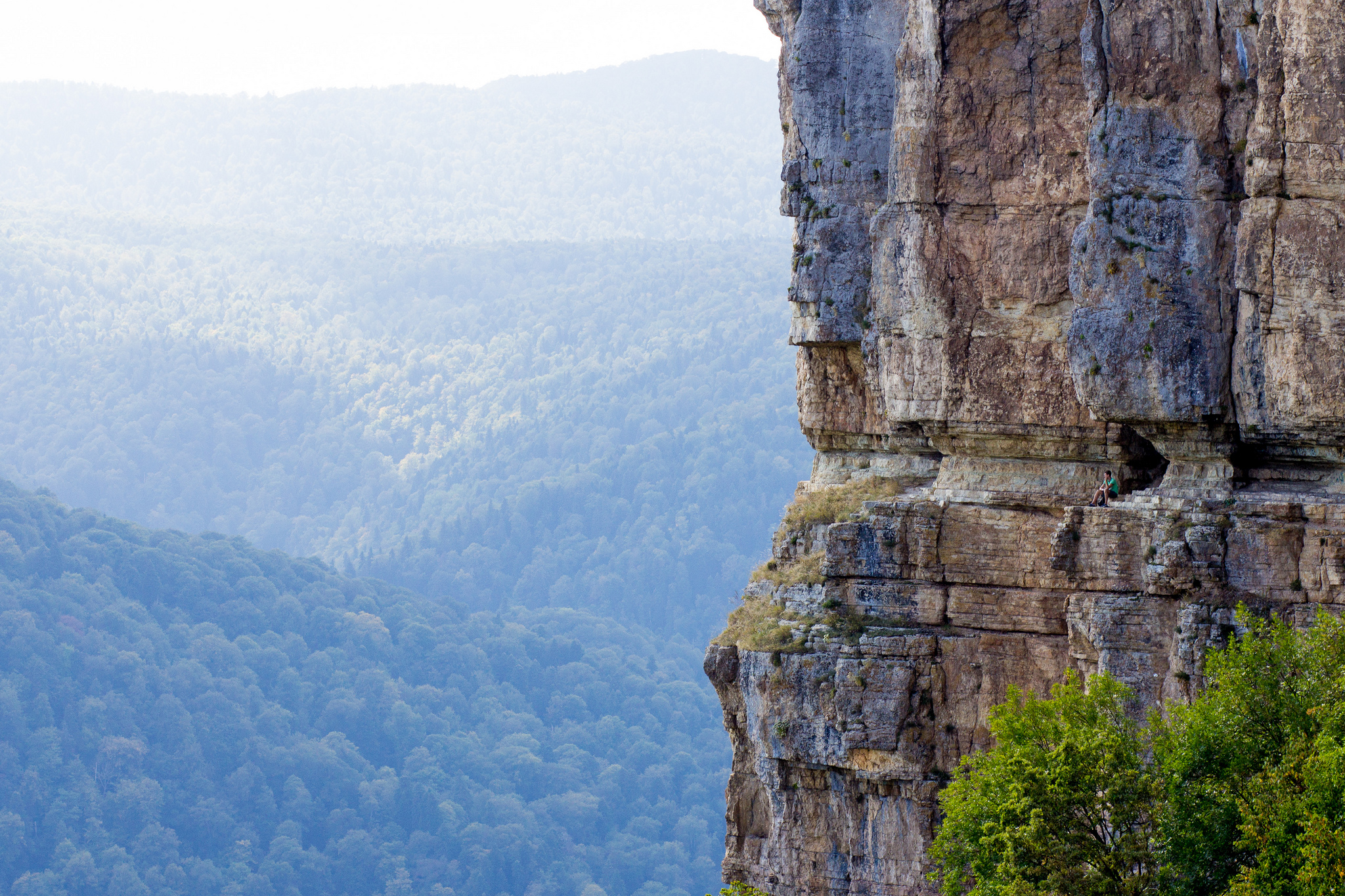 Mezmay, Krasnodar Krai